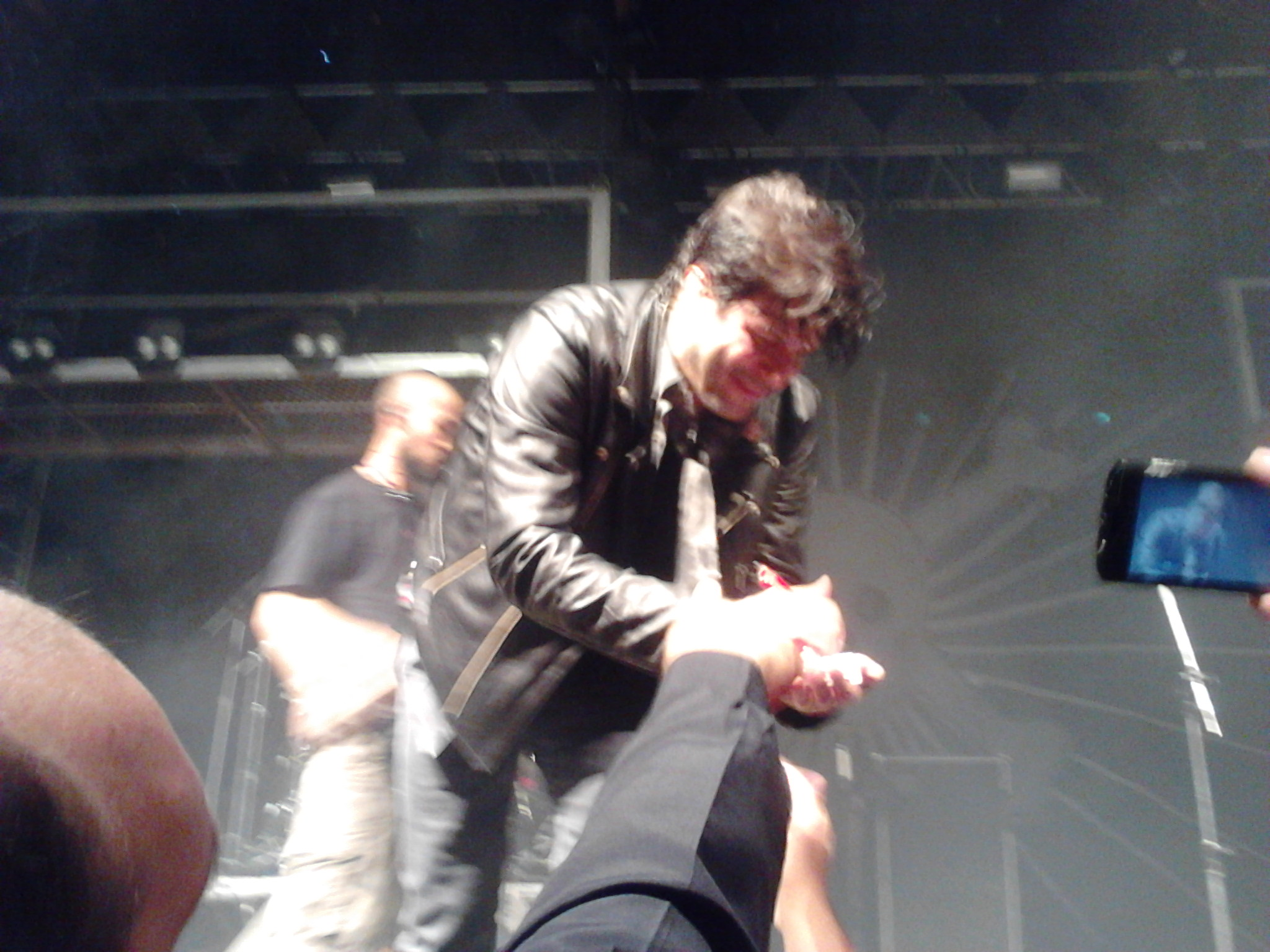 Fotografias do Show do RPM (Paulo Ricardo) em 18/11/2011 no Rio de Janeiro - Brasil